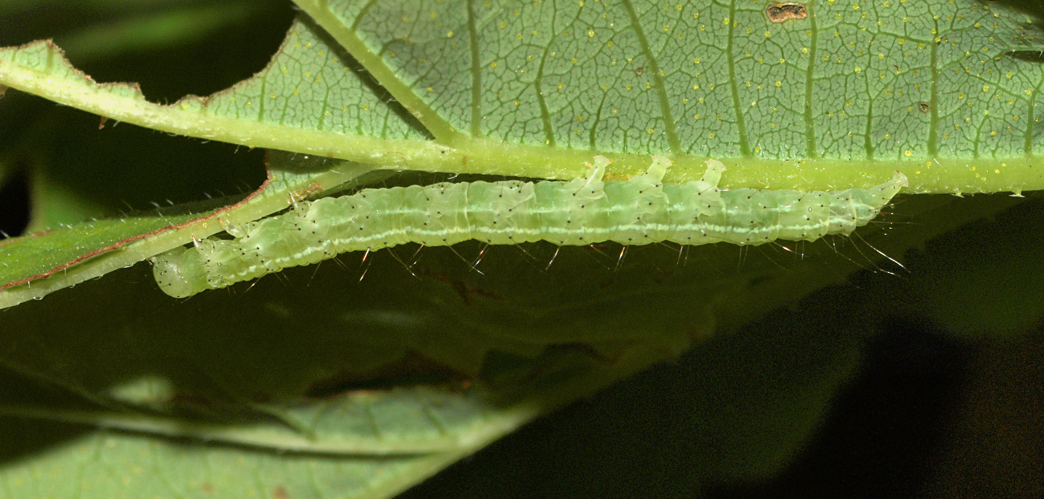 Humleugle larve på Humle.